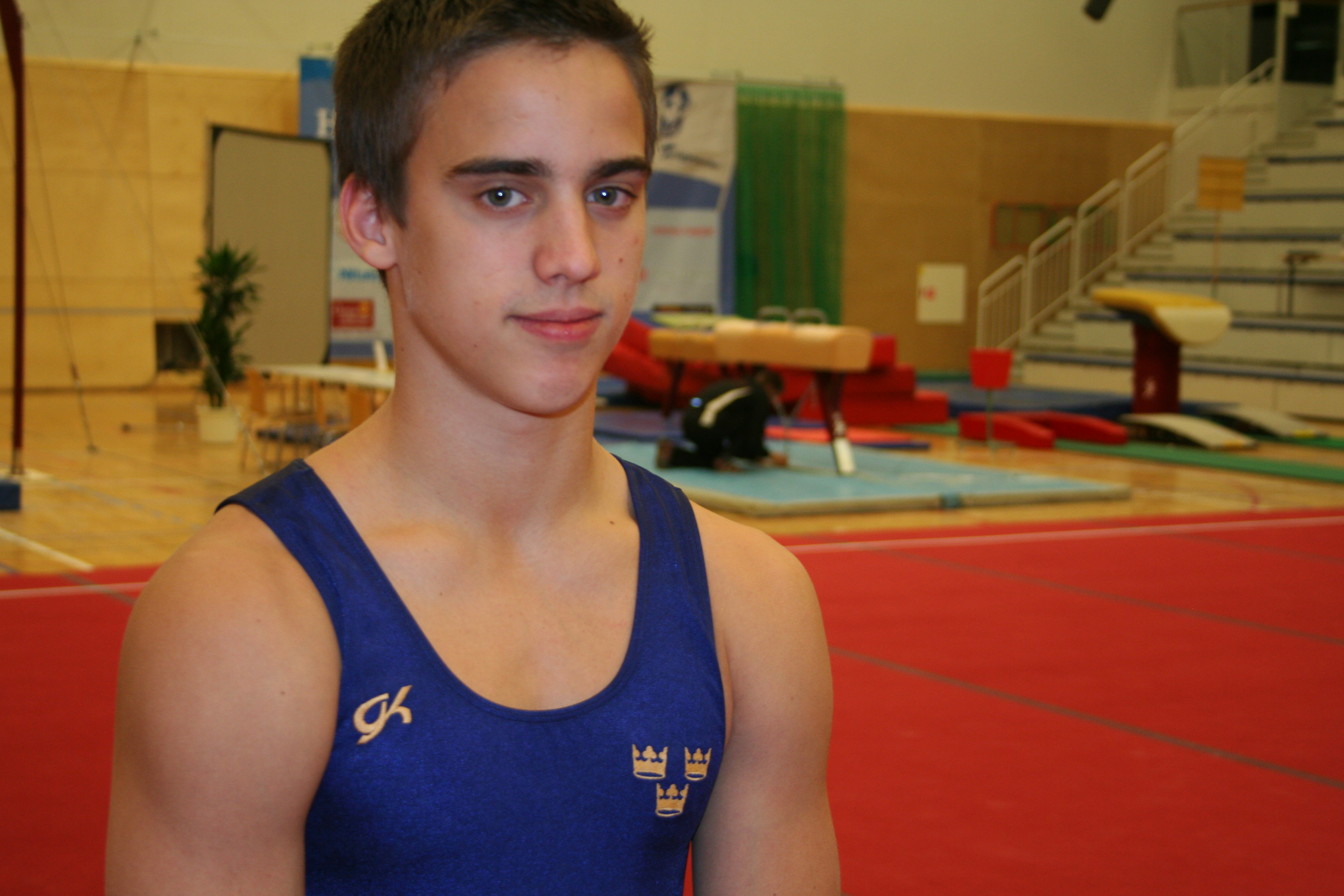 Swedish gymnast Måns Stenberg 2009